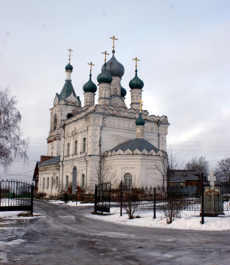 Покровский храм села Жестылево